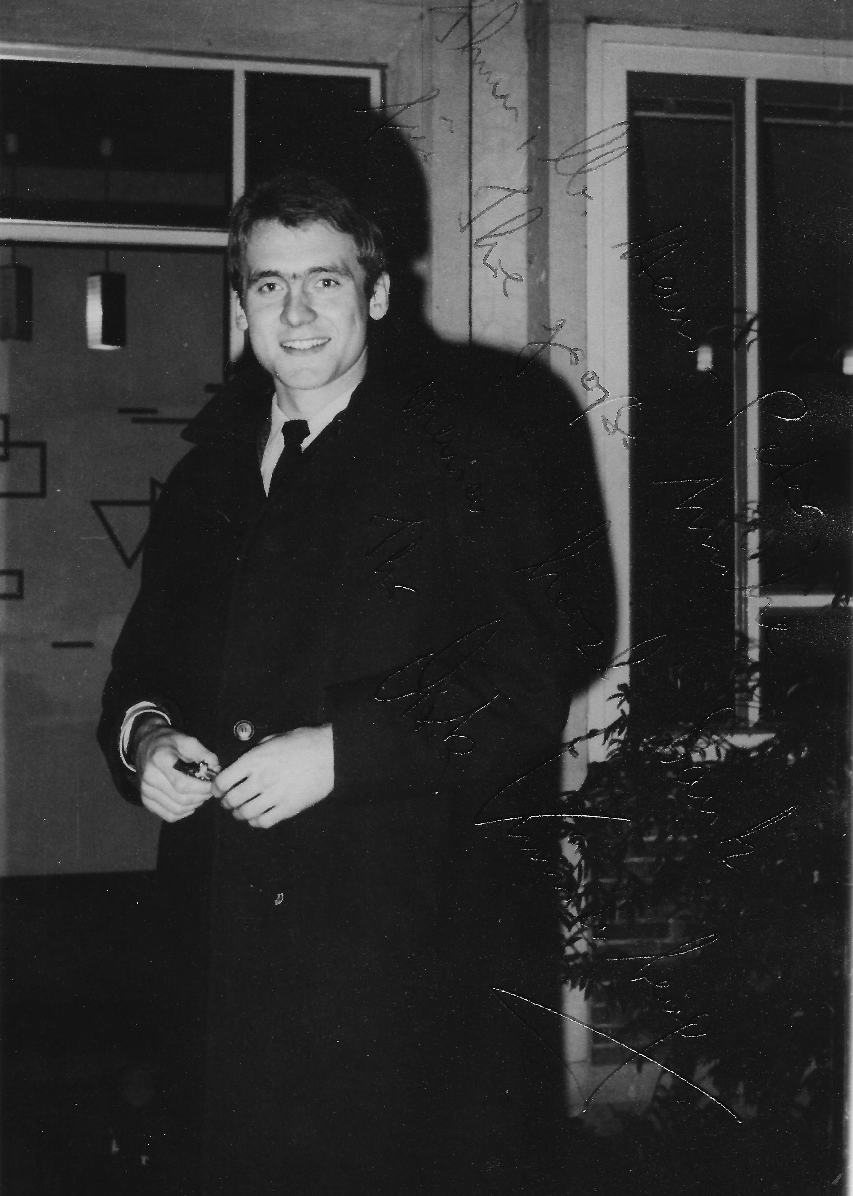 Dirk Krüssenberg; Torwart Fortuna Düsseldorf